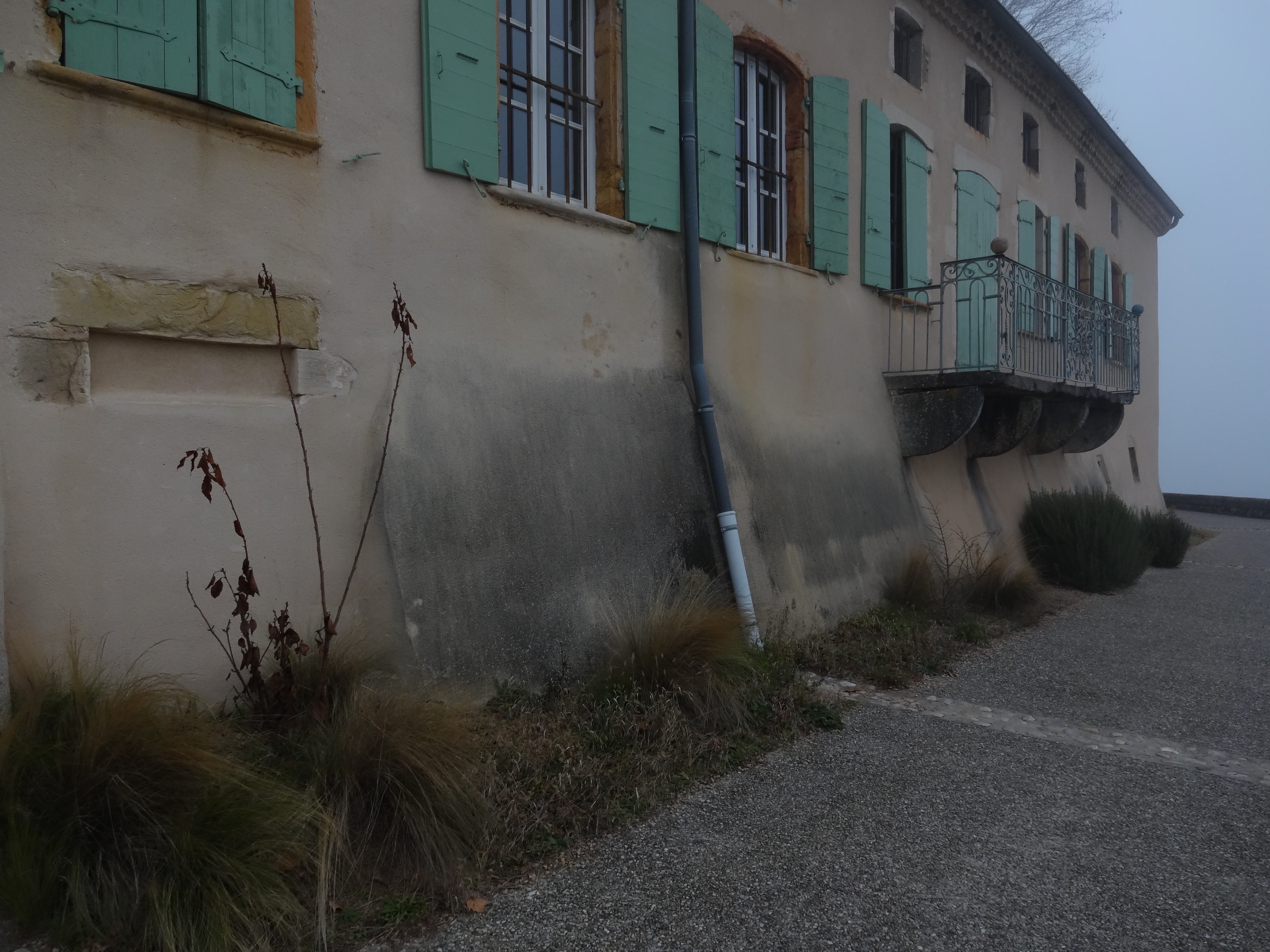 Le bâtiment de Moly-Sabata, au bord du Rhône